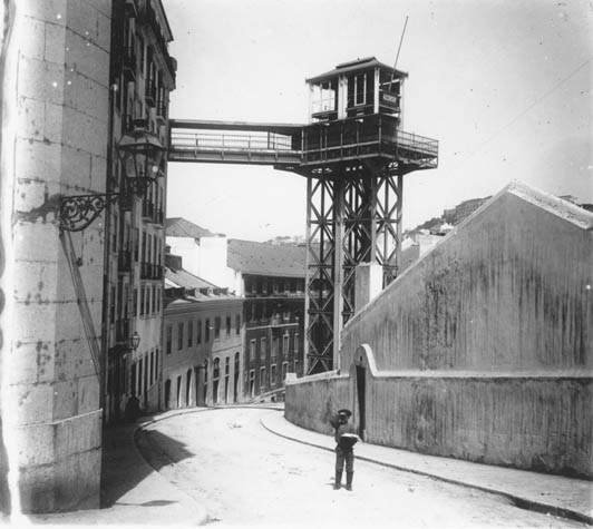 Foto do alto da Cç de São Francisco, mostrando o Elevador da Biblioteca (Lisboa).